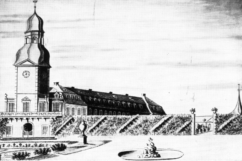 Schloss Oggersheim 1786